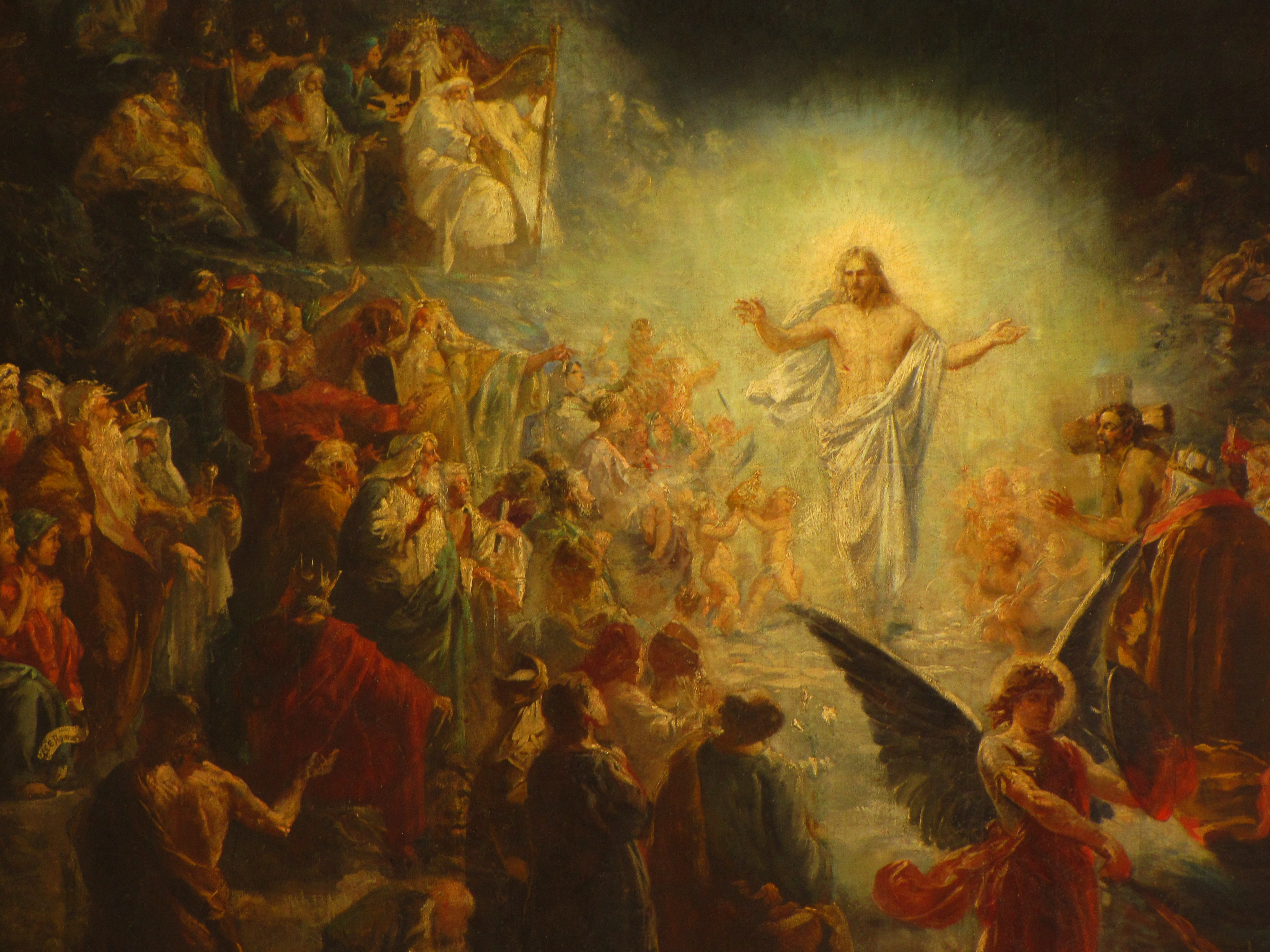 Alsace, Bas-Rhin, Église protestante de Notre Seigneur Jésus-Christ de Bischheim (PA00084621). Peinture "Le Christ aux limbes" (XXe).